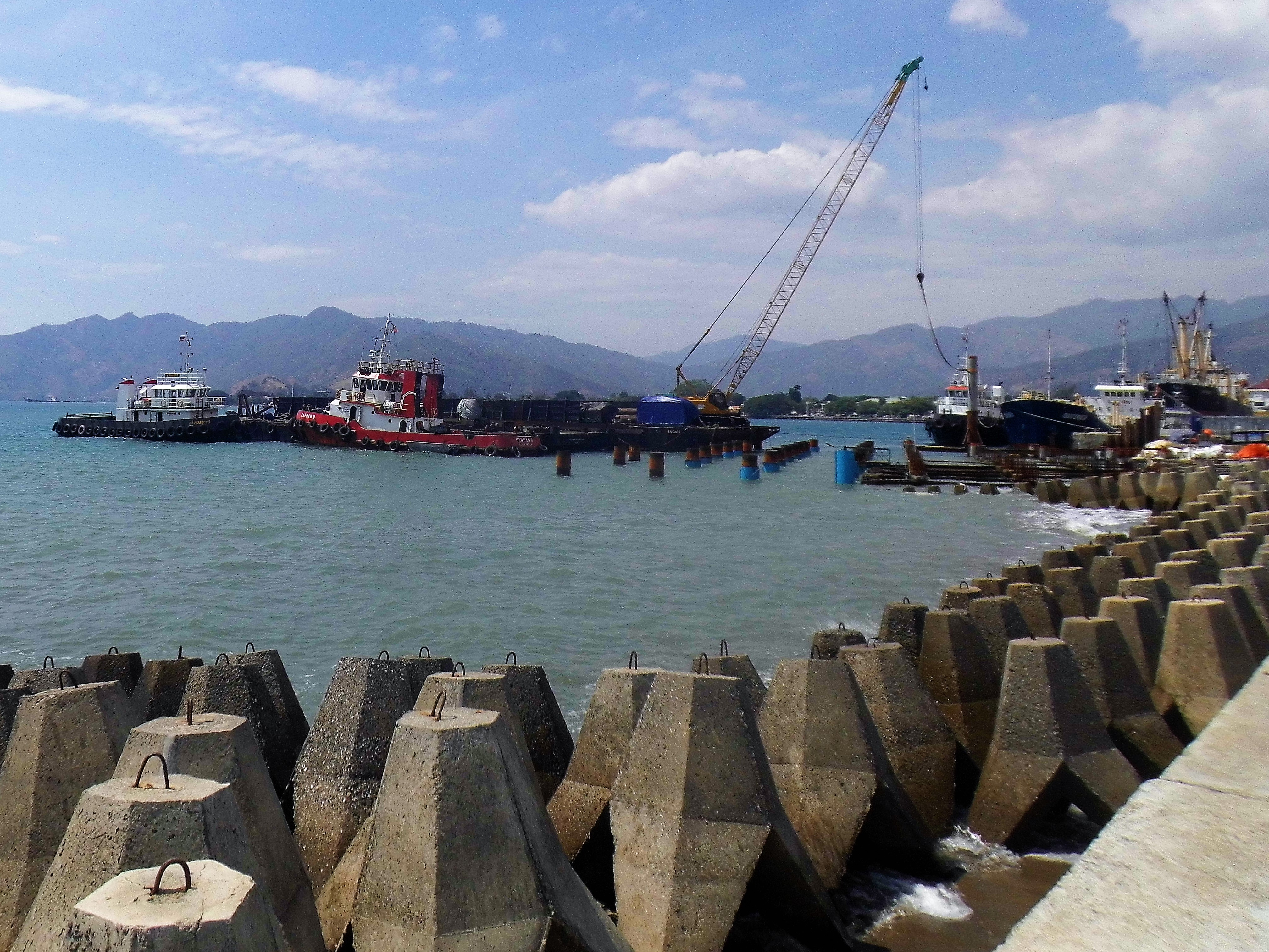 Hafen von Dili